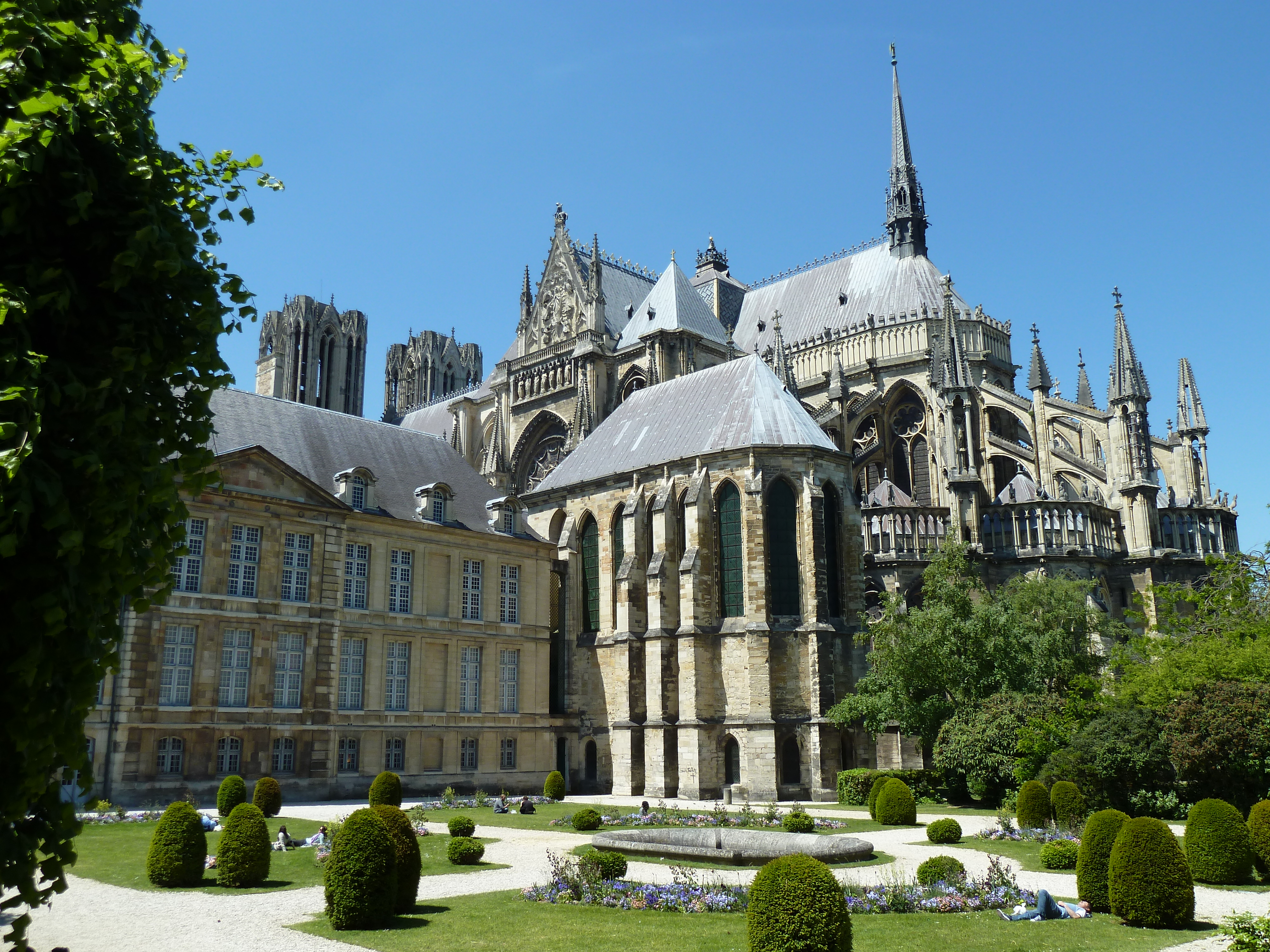 Cathédrale à Reims